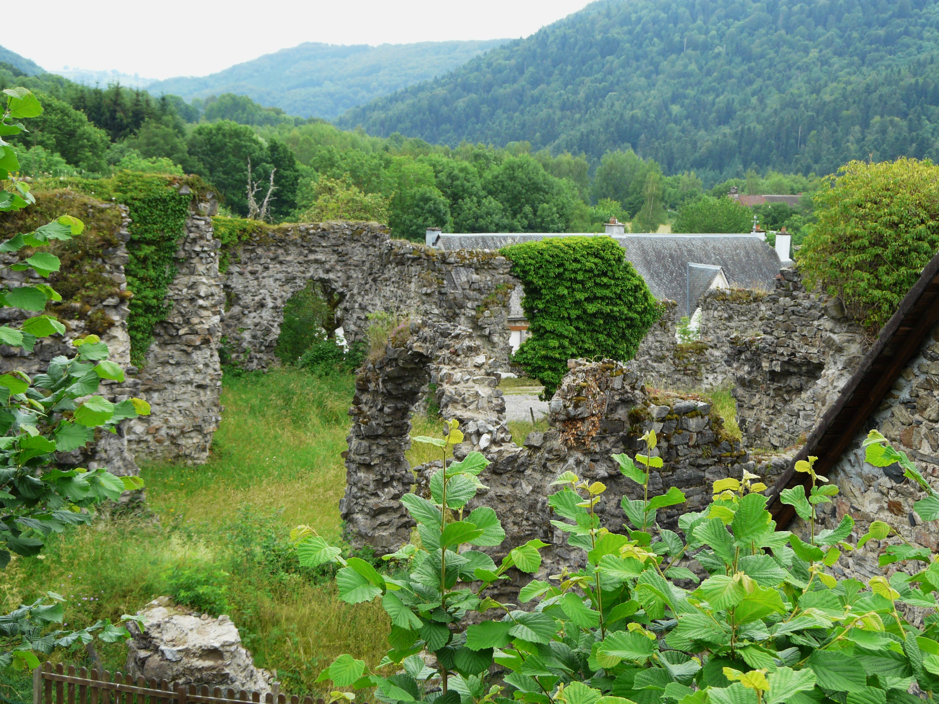 Les ruines de l'abbaye de Féniers, Condat, Cantal, France.